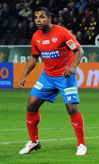 Álvaro Santos